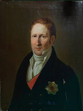 Alfred X. Herzog von Croy 1789-1861 (zeitgen. Darstellung)